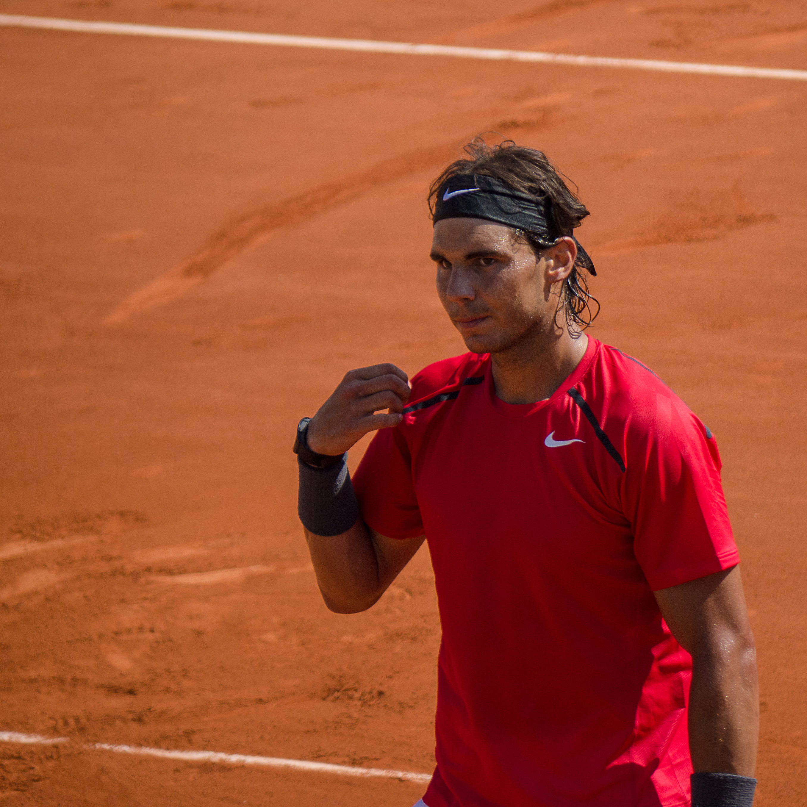 1er tour Roland Garros 2012 : Rafael Nadal (ESP) def. Simone Bolelli (ITA)